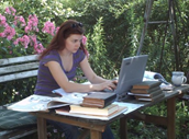 (c) privat